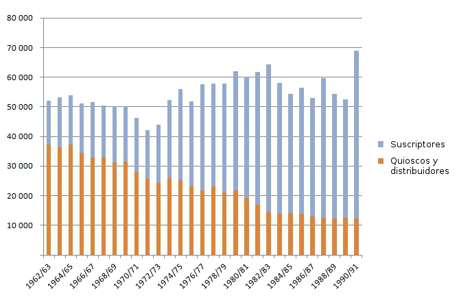 Tirada de la revista The Magazine of Fantasy & Science Fiction entre los años 1962 y 1990